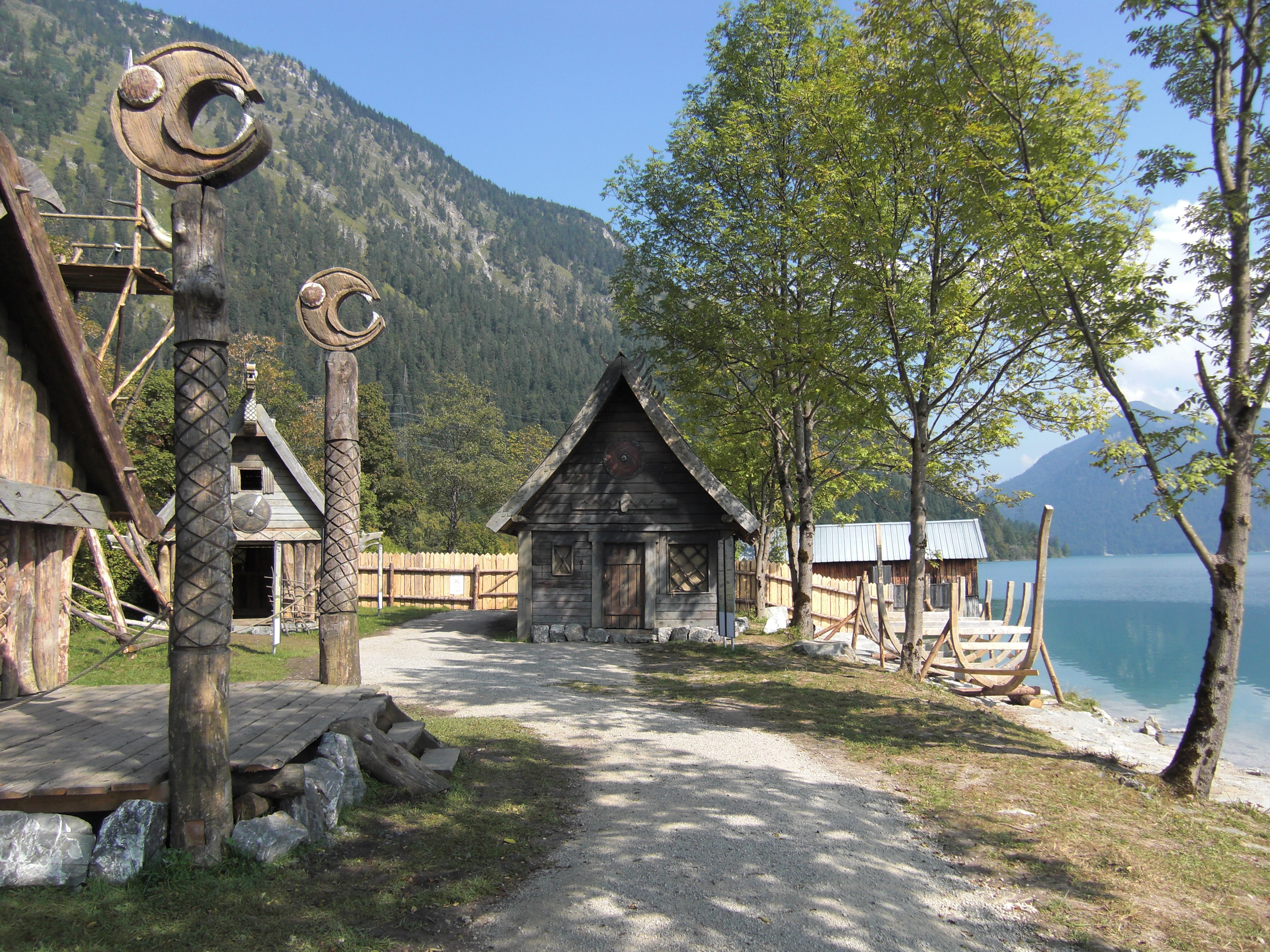 Das Wikinger-Dorf Flake aus Bully Herbigs neuem Film „Wickie und die starken Männer“. Walchensee in Jachenau.